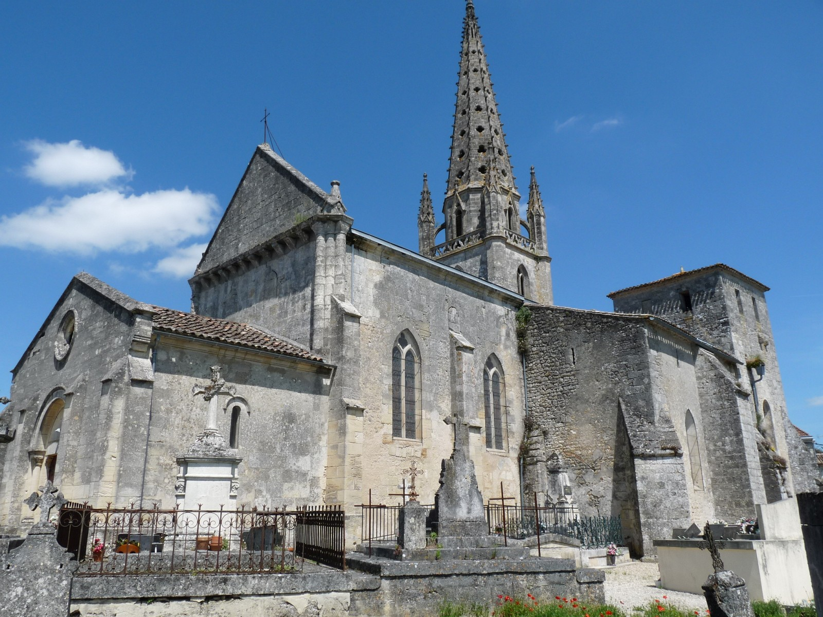 Eglise de Salignac, Gironde, France